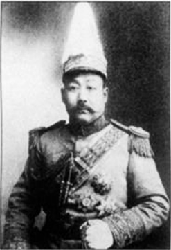 担任陆军第一师师长时的许兰洲。